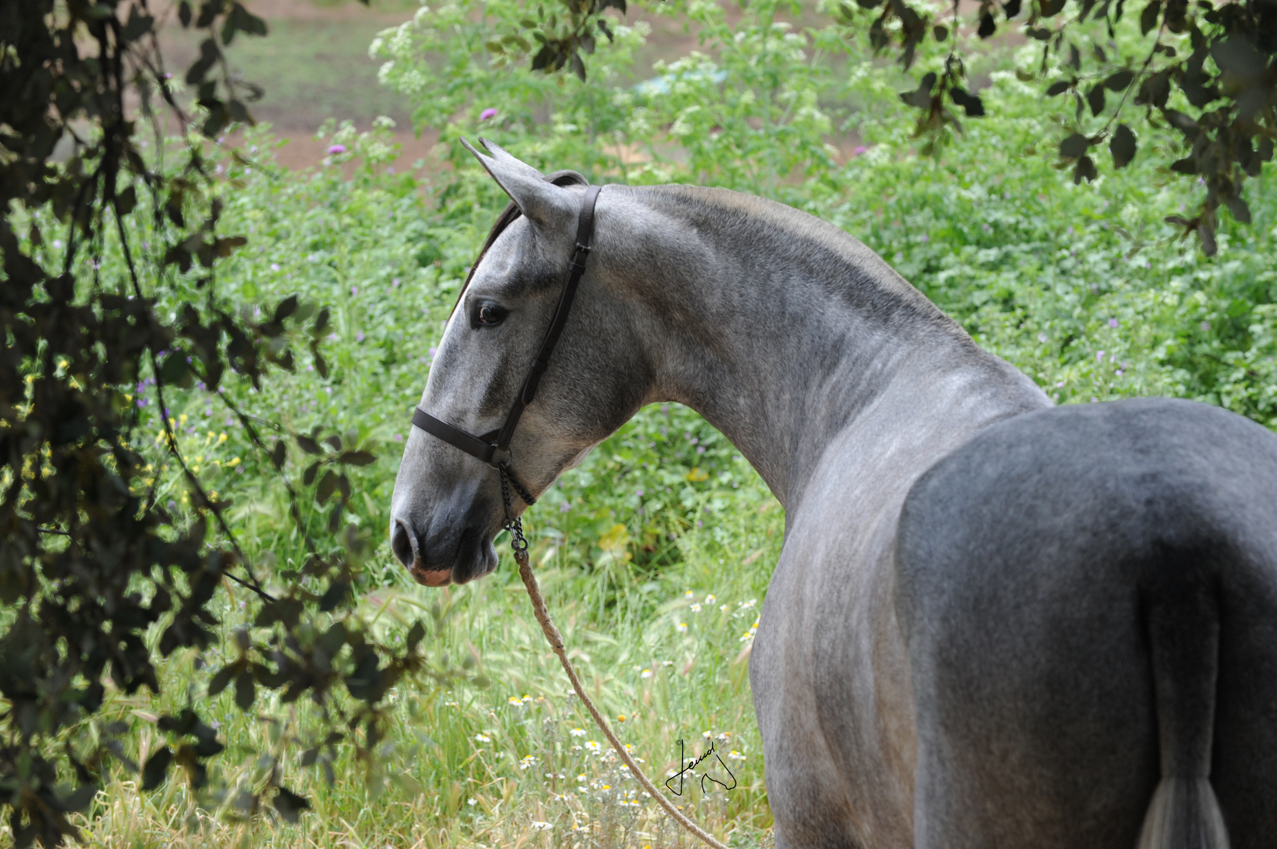 Oliva Alborán, potra de concurso de Yeguada Alborán. Pura Raza Española criada en libertad.